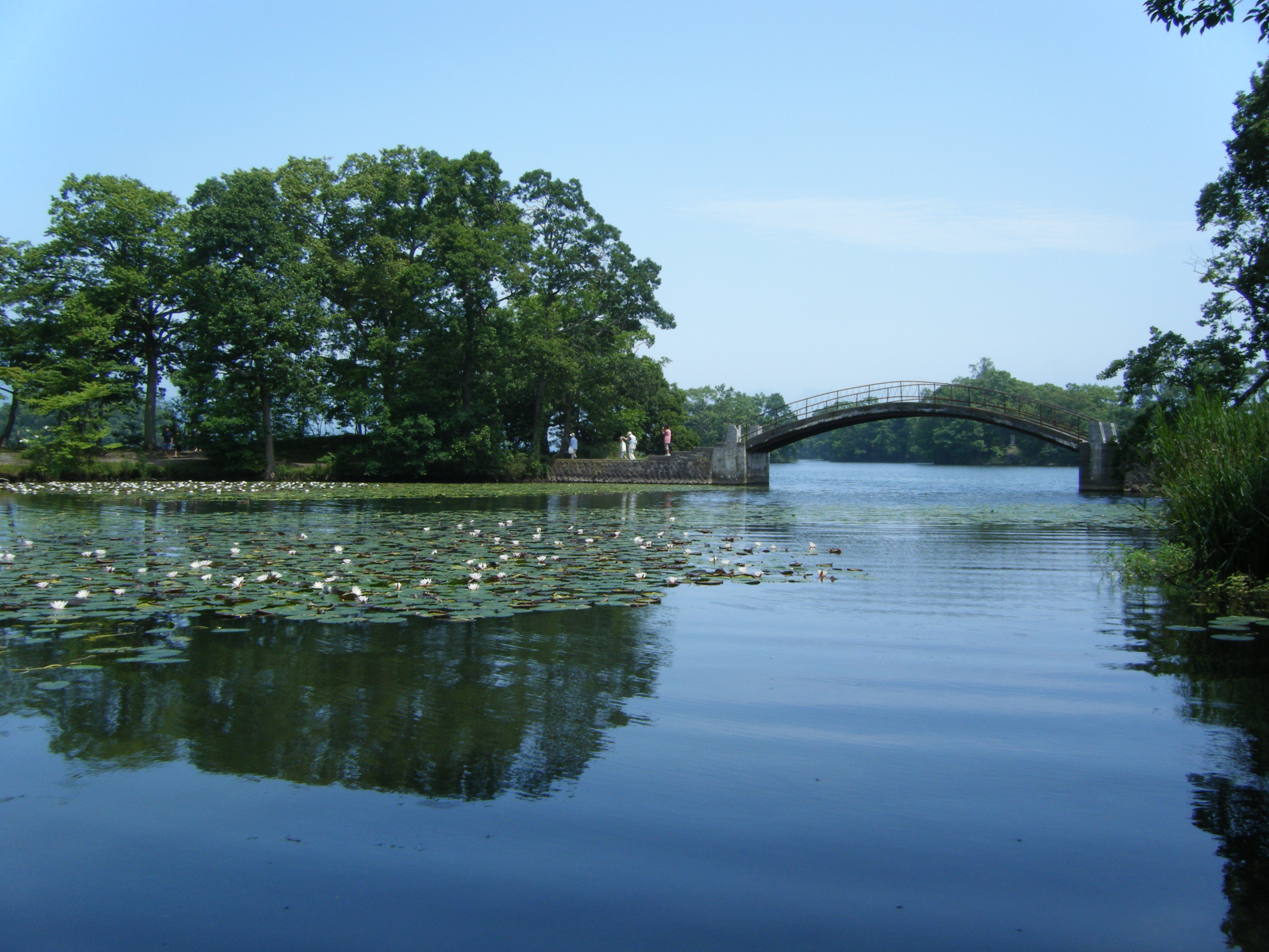 スイレンの咲く大沼国定公園。